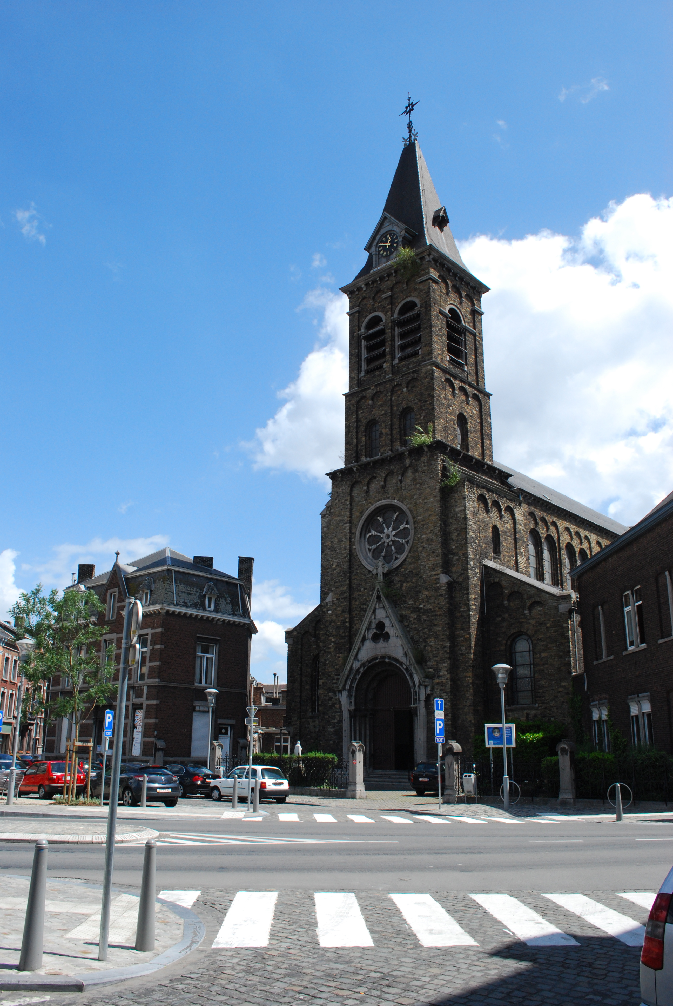 L'église Sainte-Marie des Anges sur la place des Franchises à Liège.